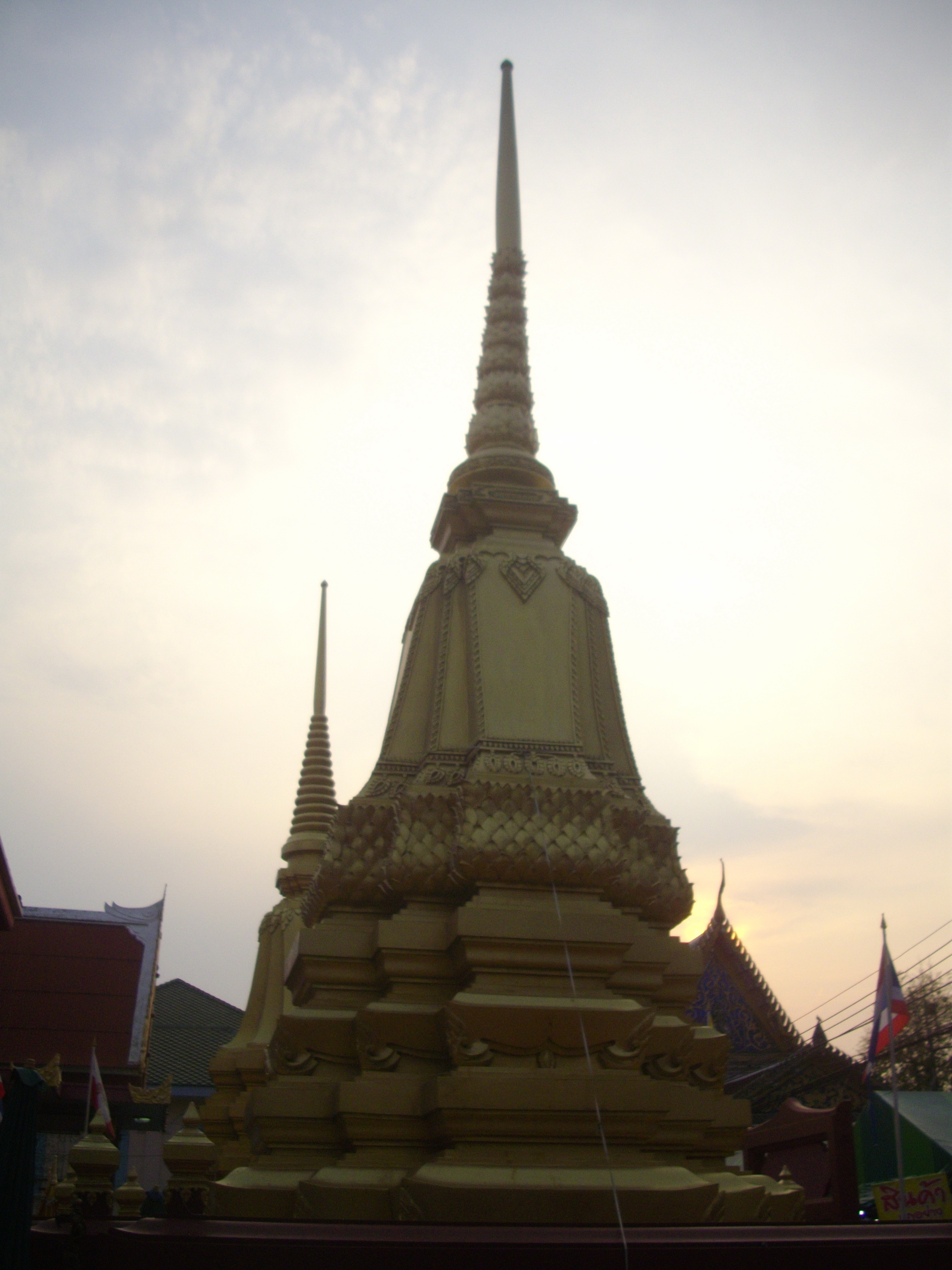 พระสถูปบรรจุพระบรมอัฐิของสมเด็จพระเจ้าตากสินมหาราช ณ วัดอินทาราม (วัดบางยี่เรือนอก หรือวัดบางยี่เรือใต้) แขวงบางยี่เรือ เขตเทอดไทย กรุงเทพมหานคร